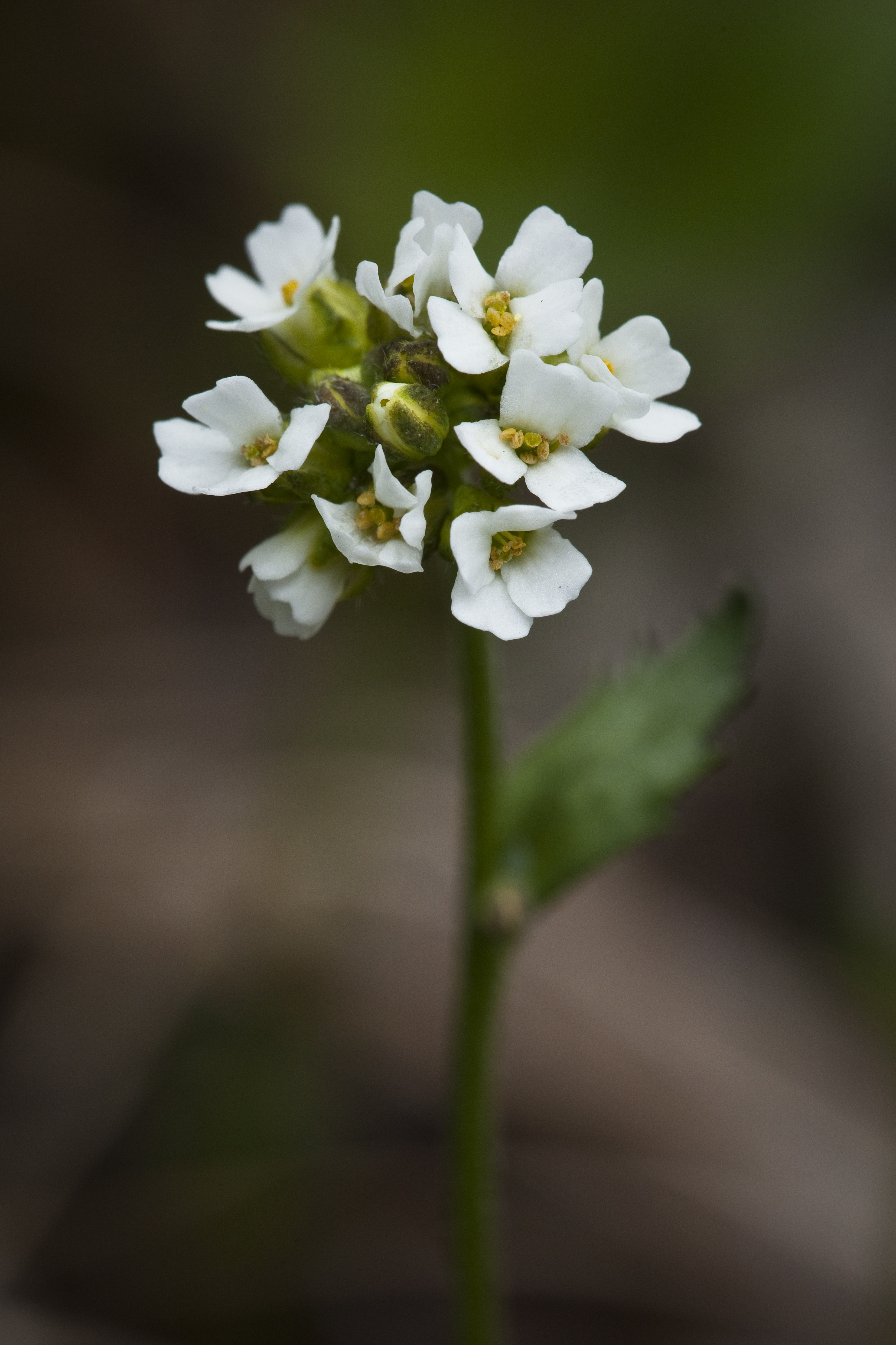 Draba hirta NPS / Jacob W. Frank